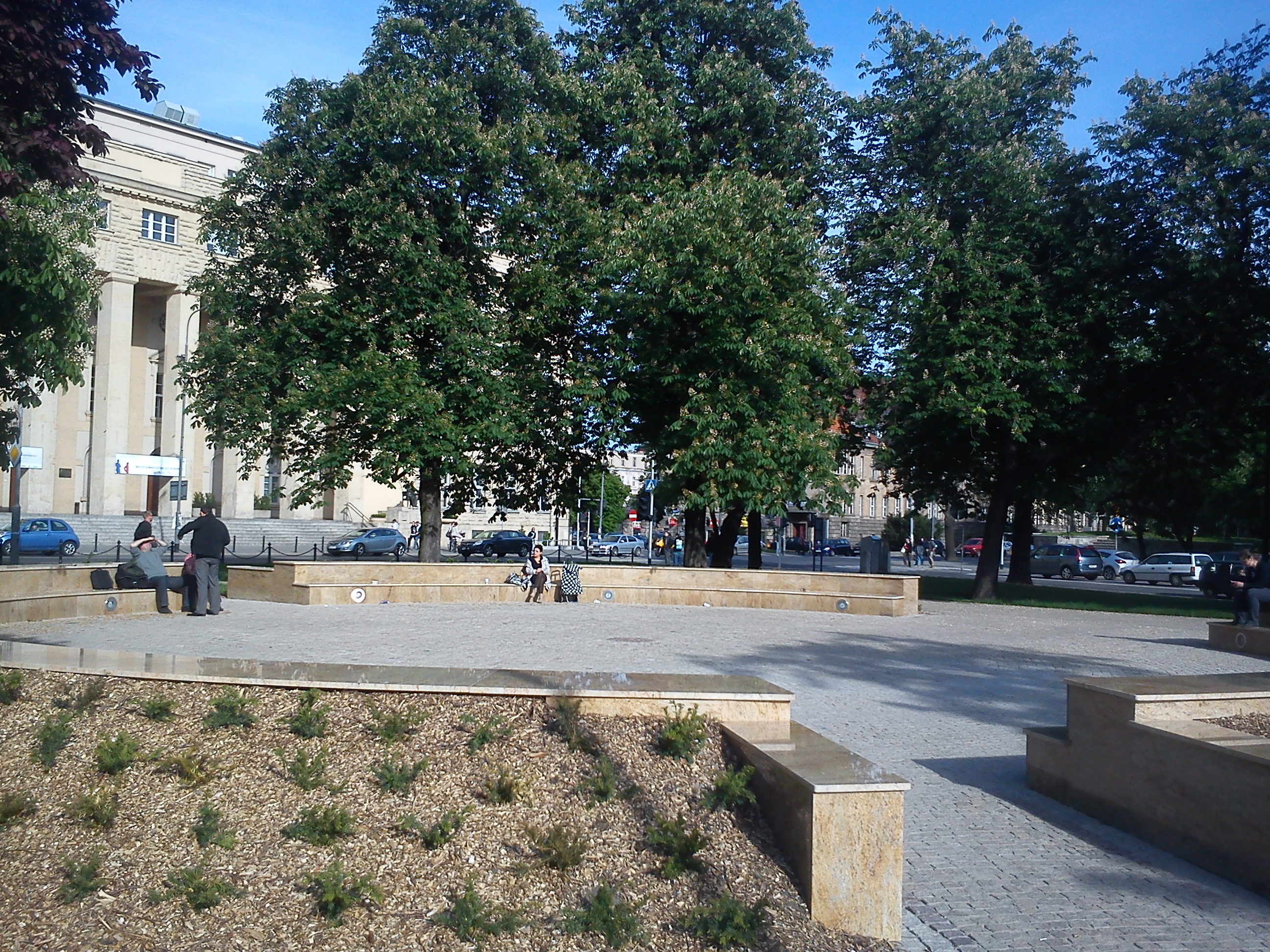 Forum Academicum, Poznań. Park Maciejewskiego, Uniwersytet Ekonomiczny.